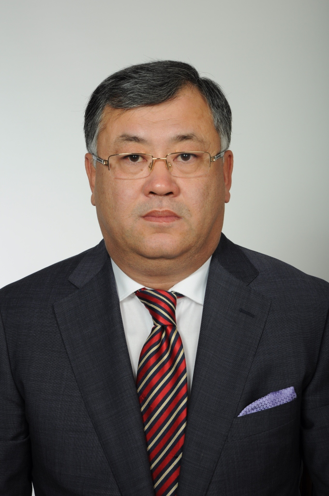 Фото доктора юридических наук, профессора, ректора Карагандинского университета "Болашак"